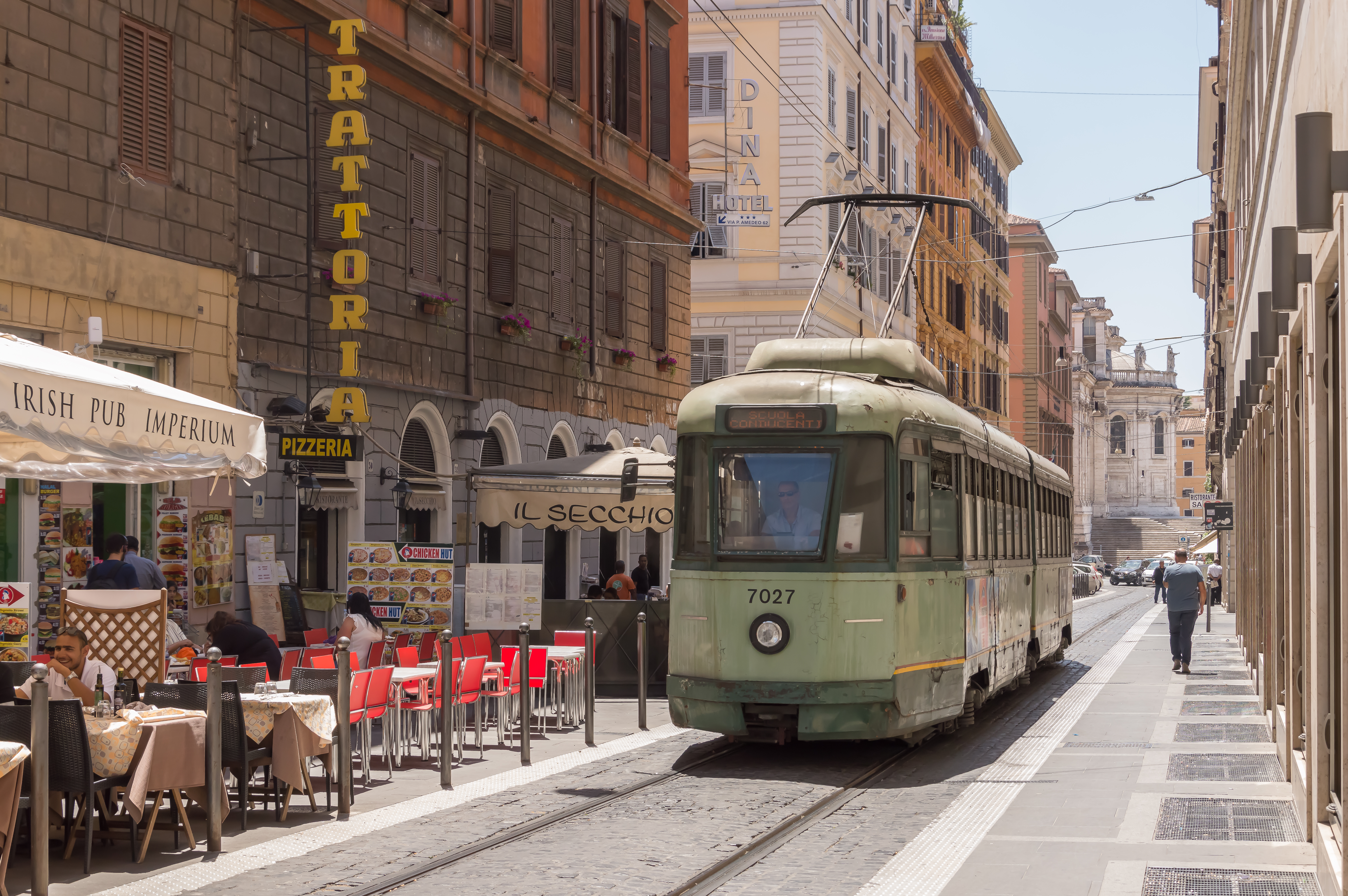 Erg leuk in Rome is, dat tussen de moderne trams, ook oude rijden. Zoals tram 7027 die zich door smalle straatjes, vlak langs terrasjes een weg baant naar het hoofdstation Termini.